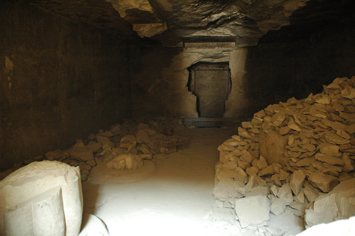 Grab des Ramose (TT55), Zeit des Amenophis III. und Echnaton, in Scheich Abd el-Gurna